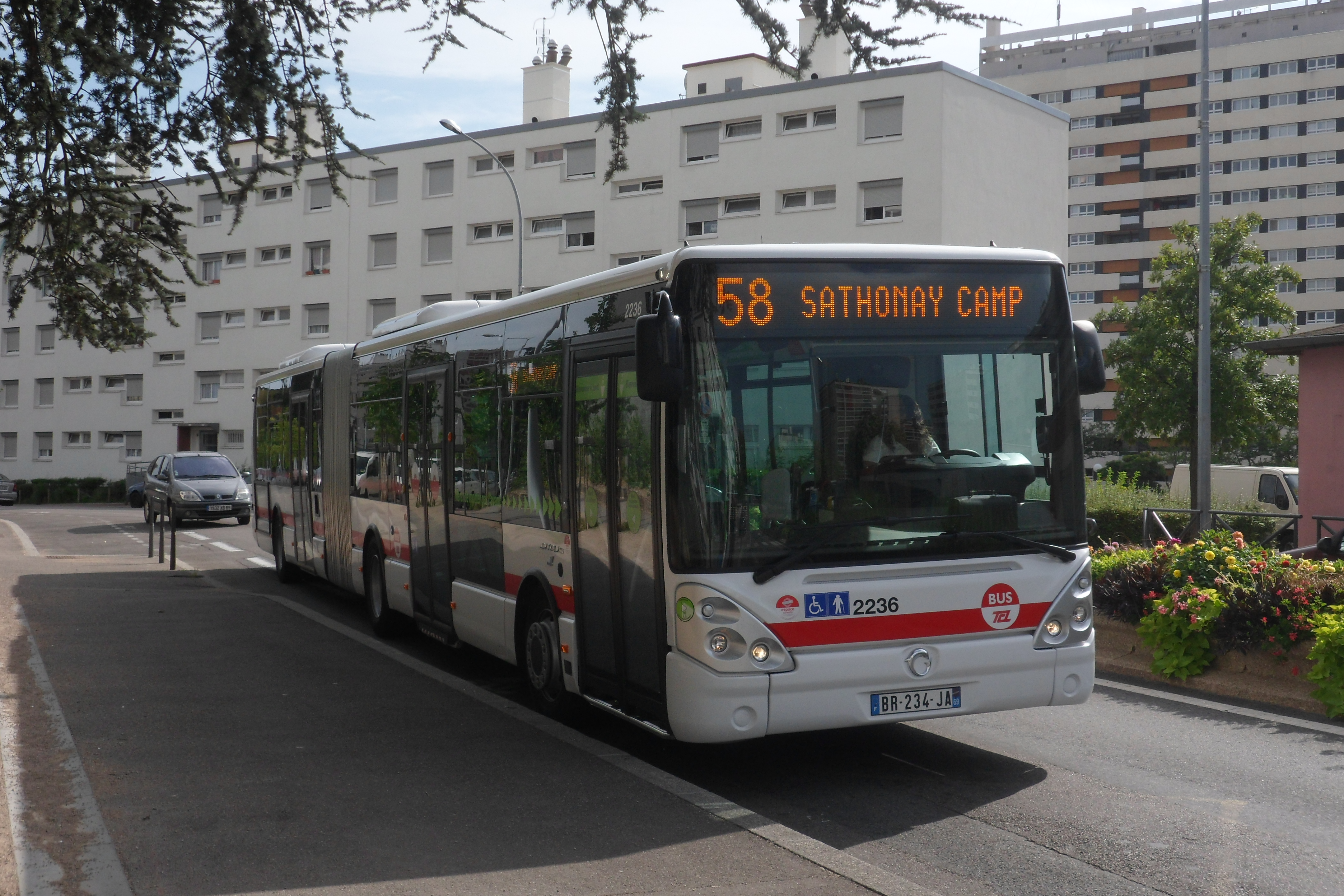 Un Citélis 18 sur la ligne 58 à Rillieux Semailles en direction de Sathonay Camp. Avec Atoubus, la 58 est devenue C5.